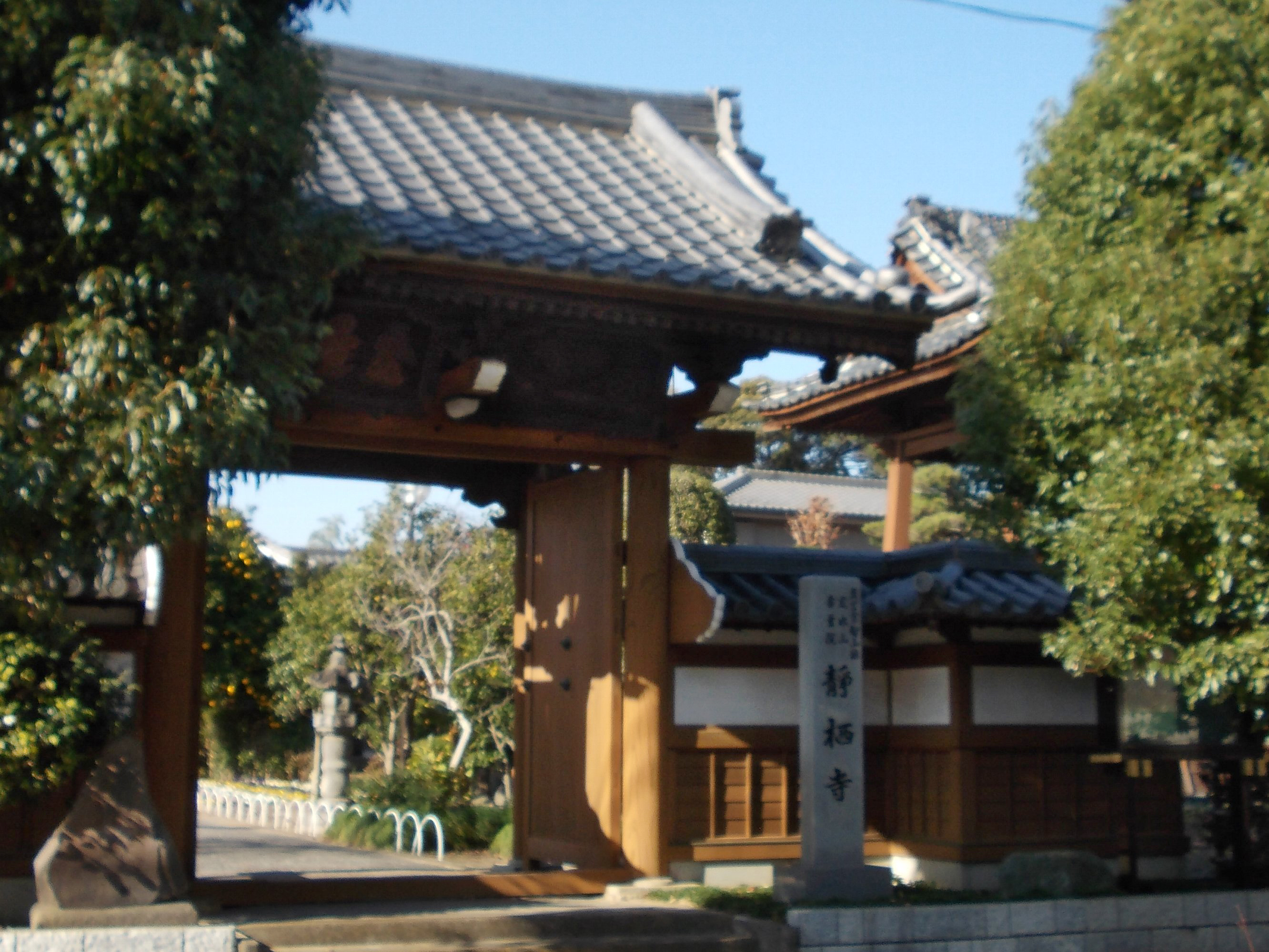 松伏石川民部・静栖寺